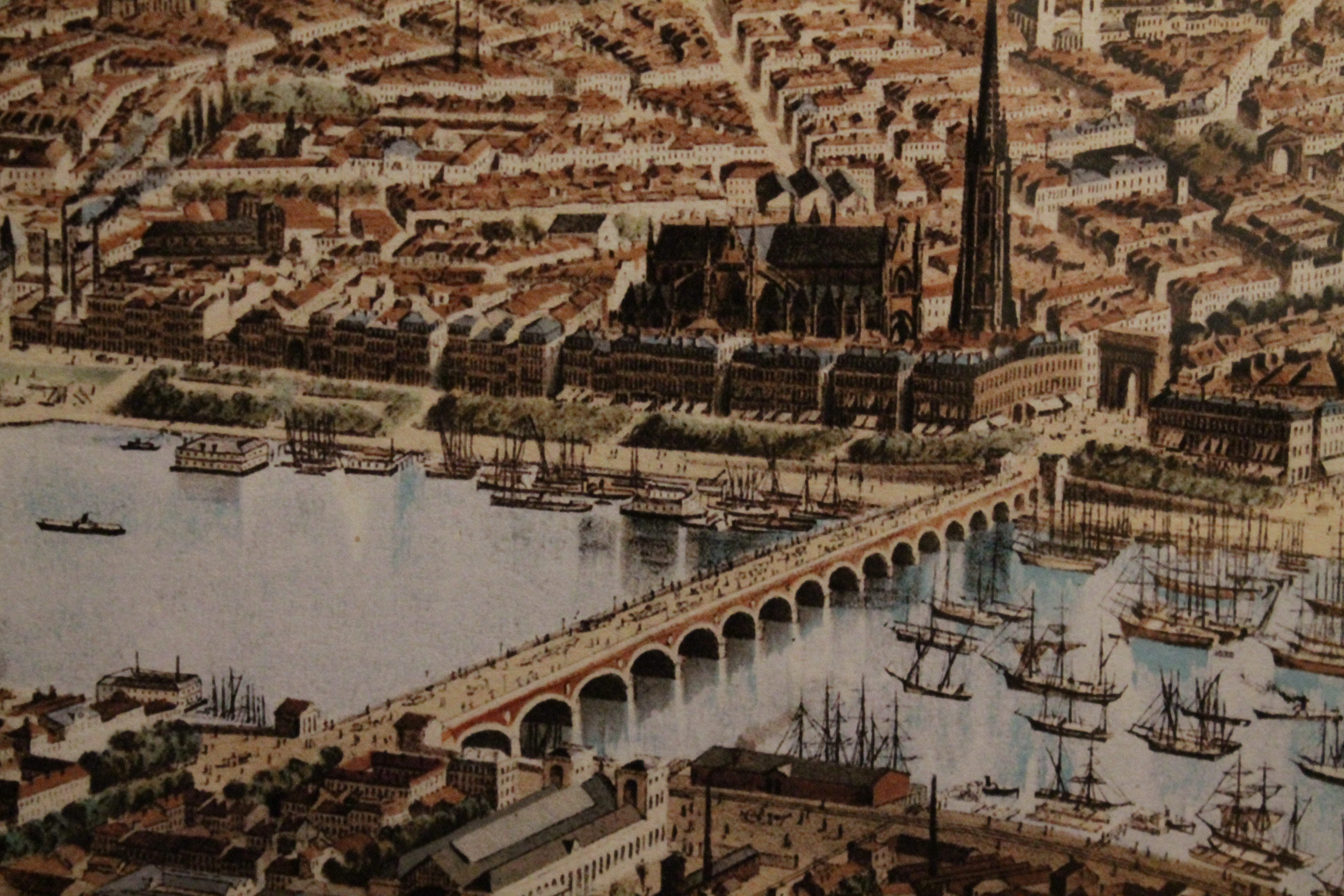 Vue cavalière de Bordeaux, détail sur le pont de Pierre.